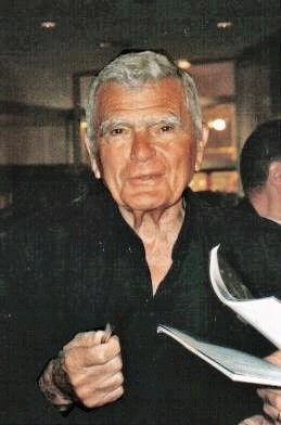 Janusz Morgenstern - polski reżyser filmowy